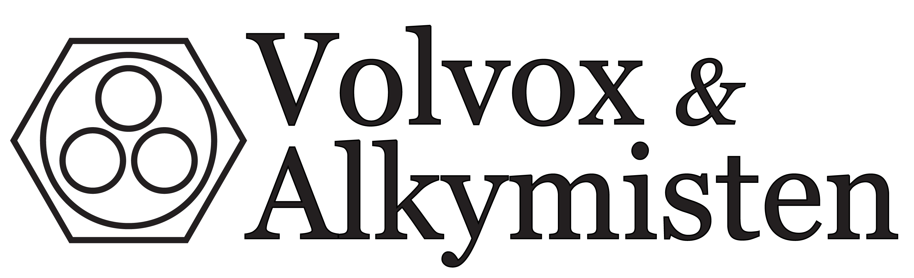 Dette er den offisielle logoen til Volvox & Alkymisten pr. 2014